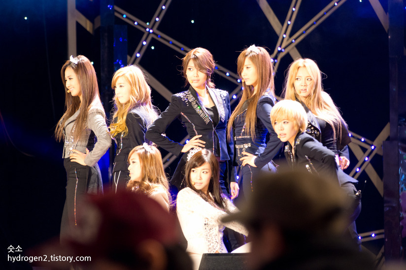 2011년 11월 21일 대한민국 대중문화예술상에서 소녀시대.